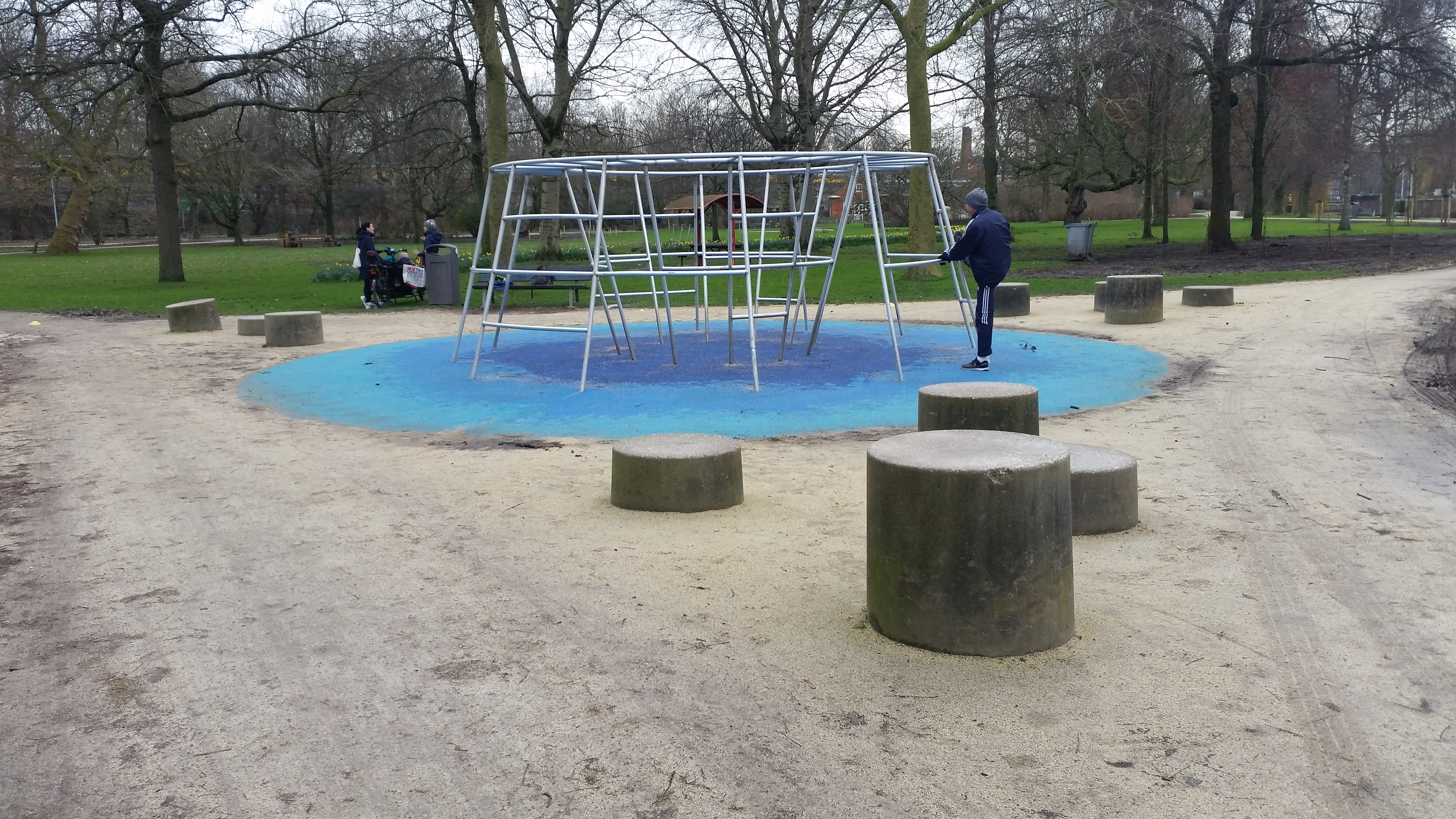 Fotoserie van het klimrek van Aldo van Eyck in het Westerpark, Amsterdam-West (januari 2020)